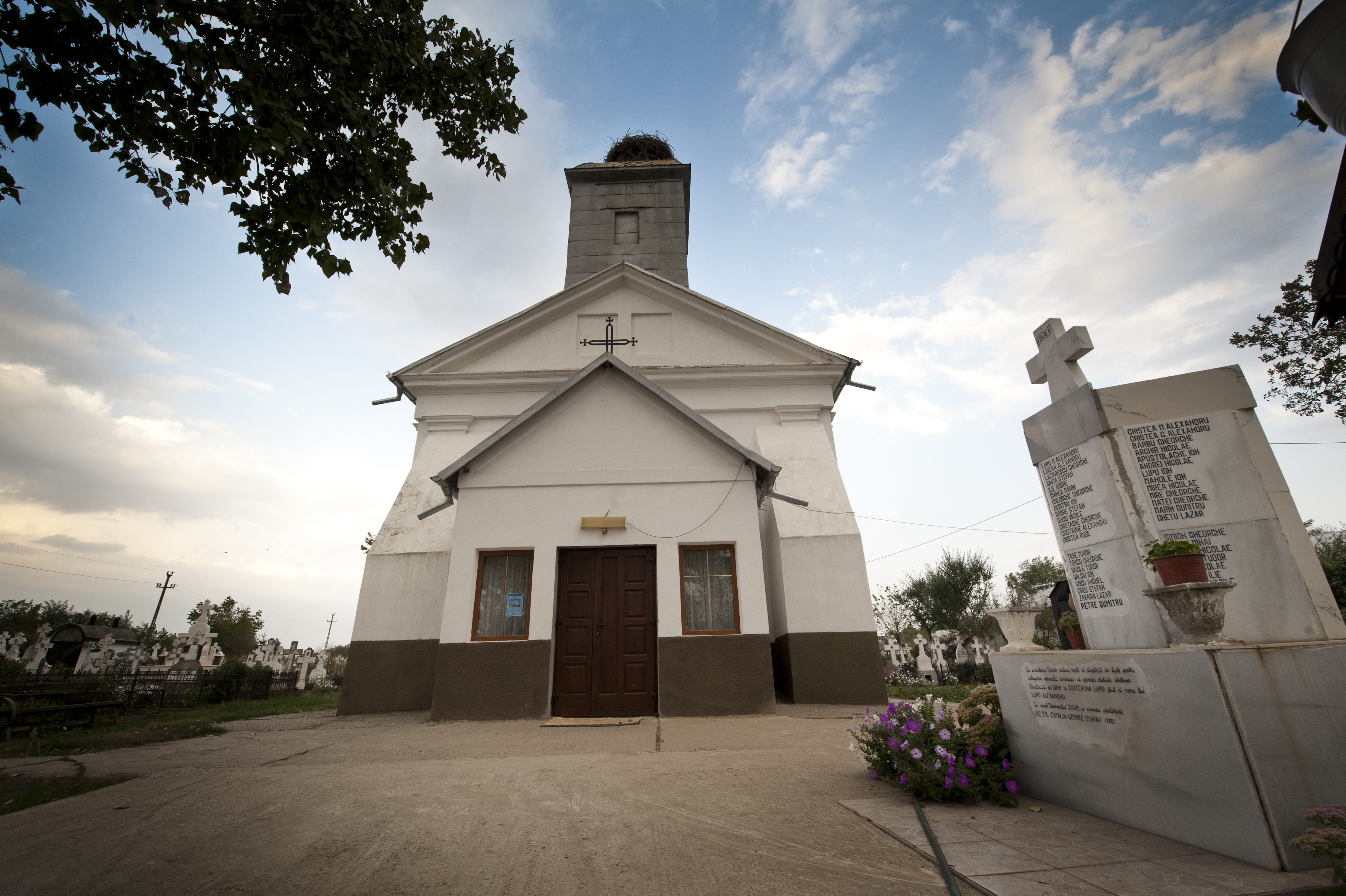 Biserica „Adormirea Maicii Domnului”